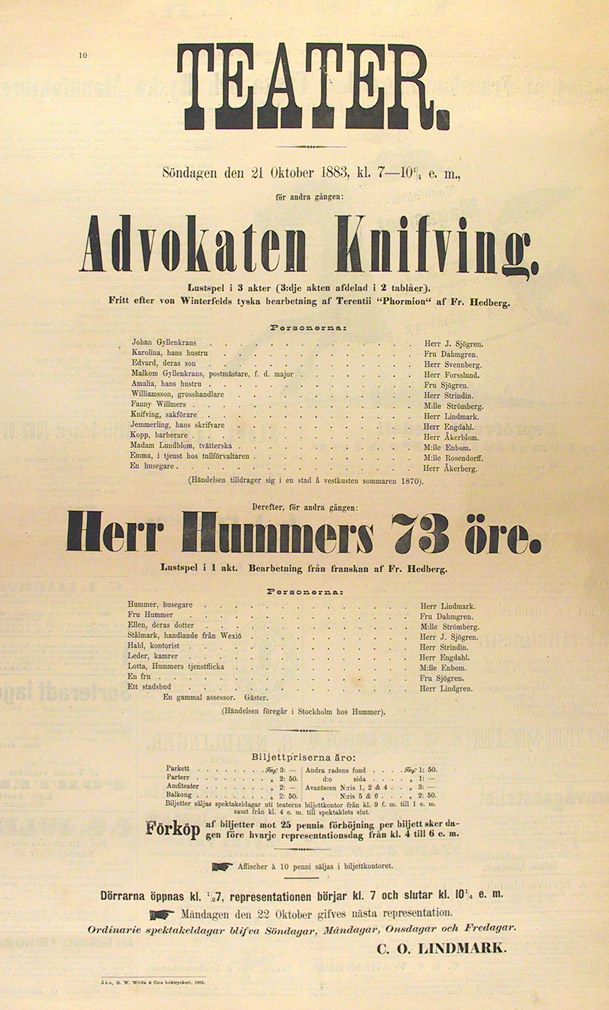 Affisch för teaterföreställningarna 1. Advokaten Knifving och 2. Herr Hummers 73 öre, båda regisserade av Frans Hedberg och med bland andra Carl Otto Lindmark i rollerna, på Åbo Svenska Teater 21.10.1883.